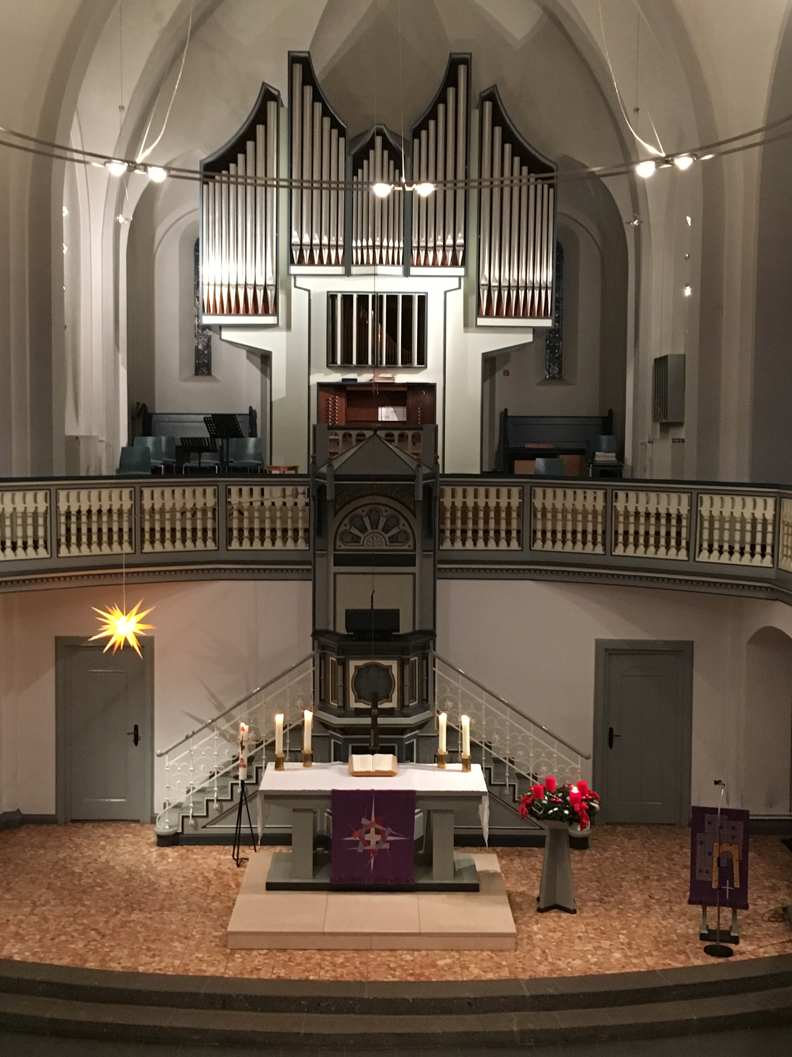 Innenansicht der Friedenskirche Duisburg-Hamborn (Blick von der Rückempore auf den Altar, die Kanzel und die Orgel)